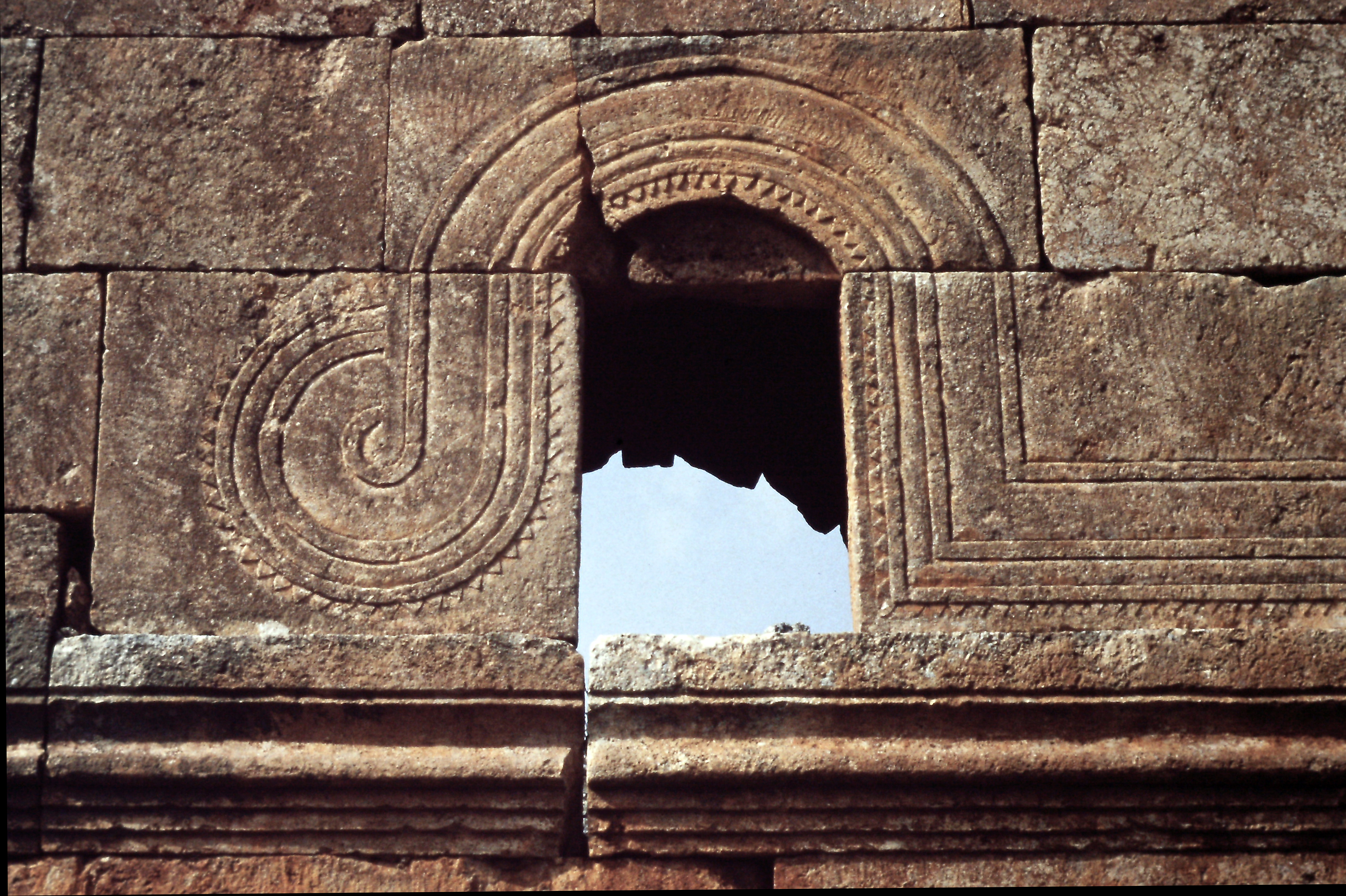 Santuario di San Simeone stilita, chiesa esterna, incorniciatura di finestra